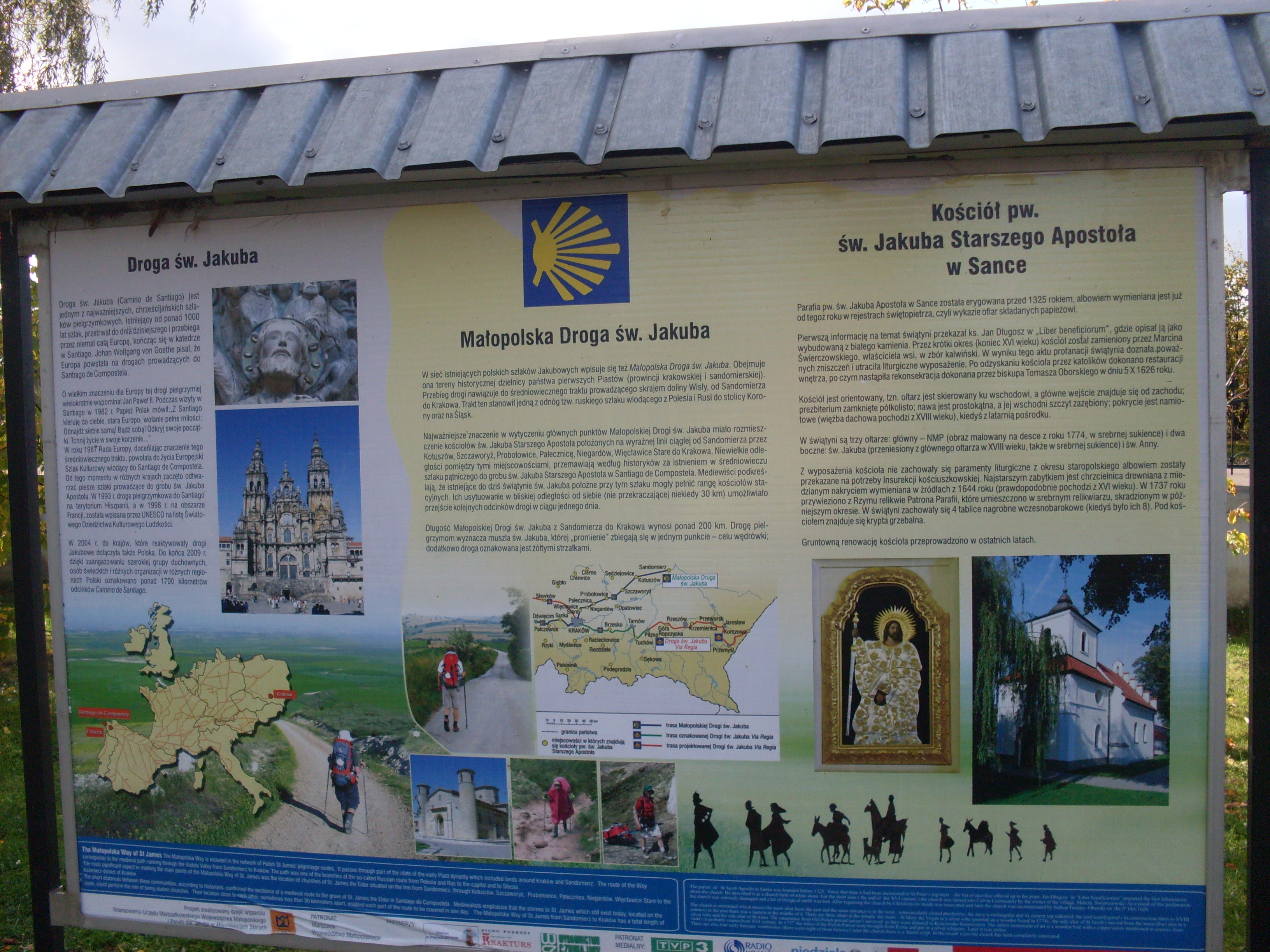 Tablica informacyjna Małopolskiej Drogi św.Jakuba przy kościele w Sance